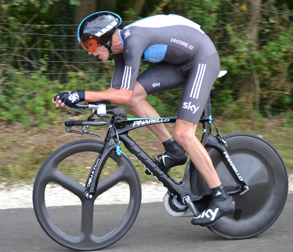 Christopher Froome TDF2012